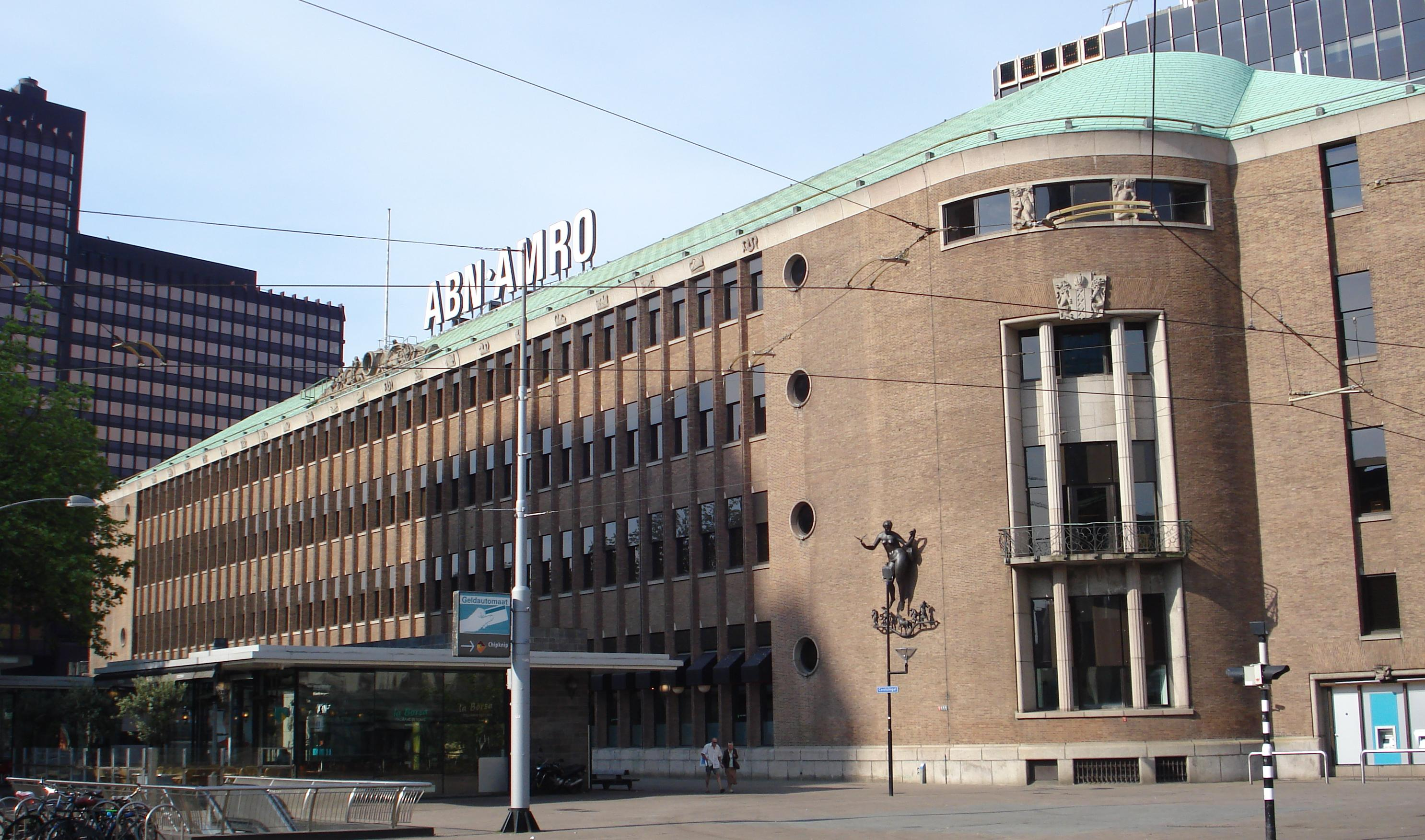 Rotterdam, Coolsingel 119, ABN-AMRO-bank. Voorgedragen als rijksmonument, oktober 2007.